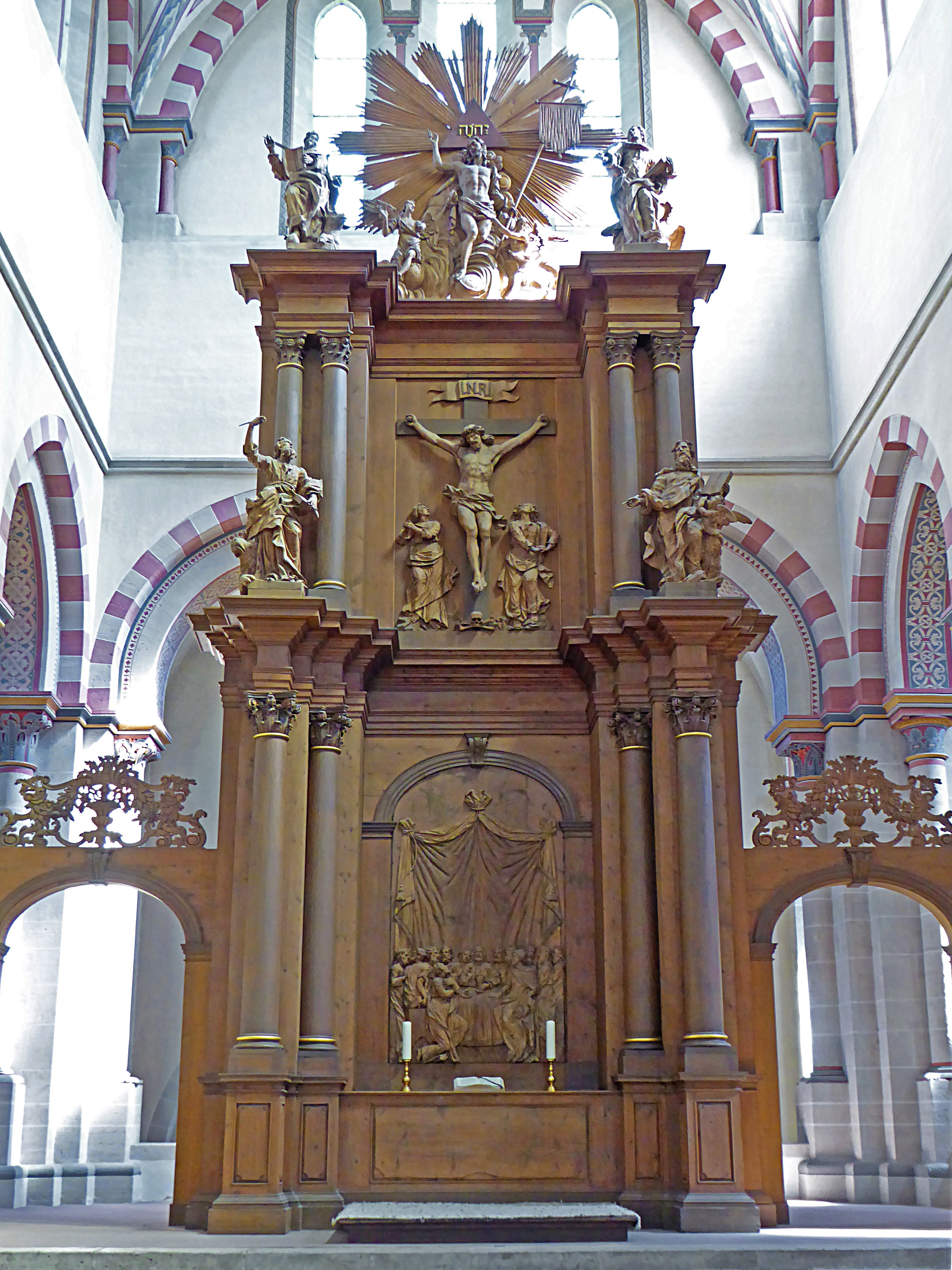 spätbarocker Hochaltar von Matthäus Heinrich Vetten von 1735 in der Klosterkirche Riddagshausen (Braunschweig)